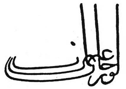 2- "Orhân bin 'Osmân", Mekece Vakfiyesi, Rebî'u'l-evvel 724-Mart 1324